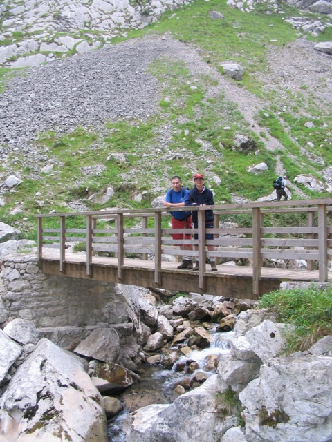 Descanso en la subida